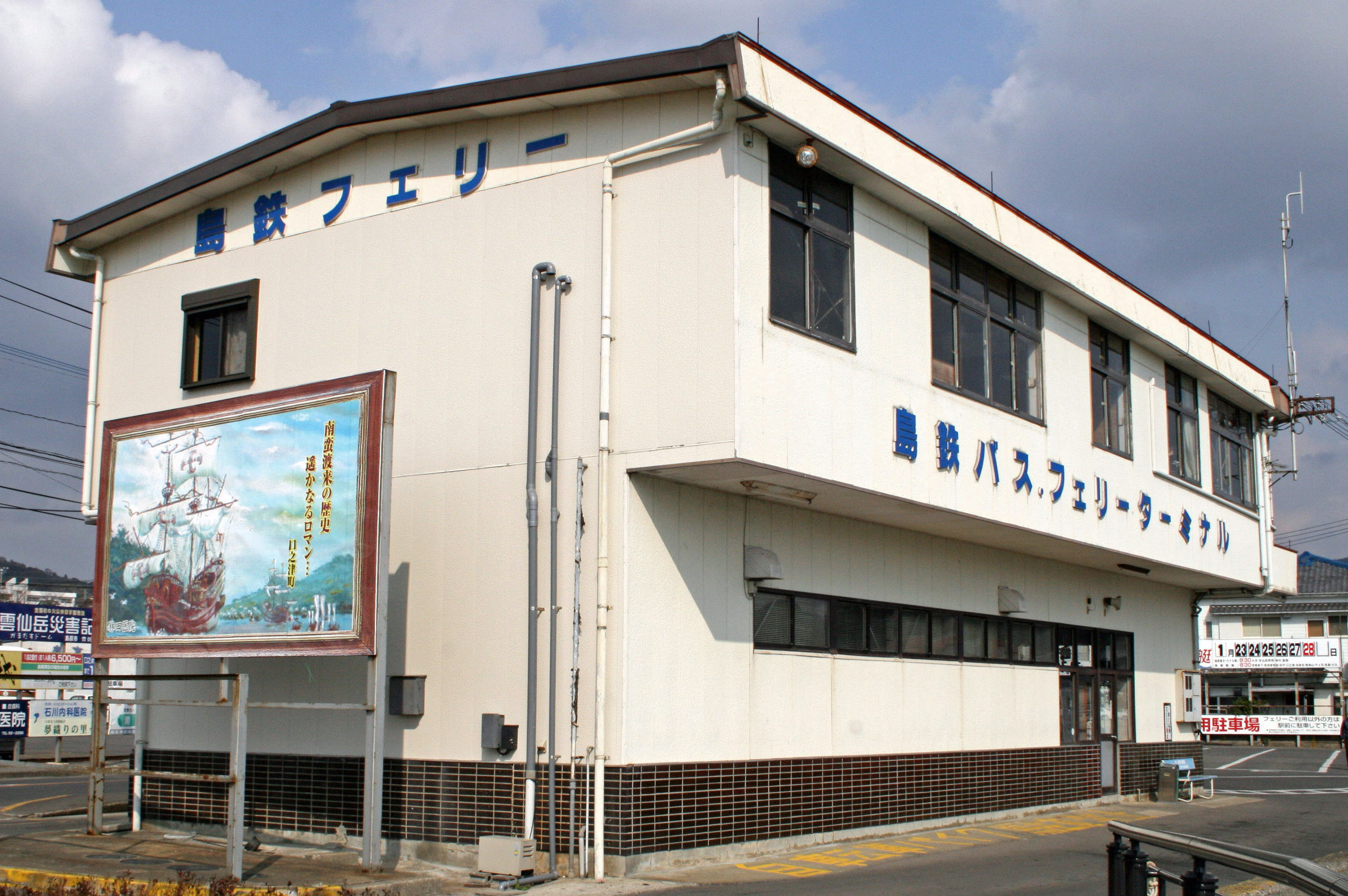 島鉄フェリー・口之津フェリーターミナル Kuchinotsu Ferry Terminal of Shimatetsu Ferry, Nagasaki Prefecture